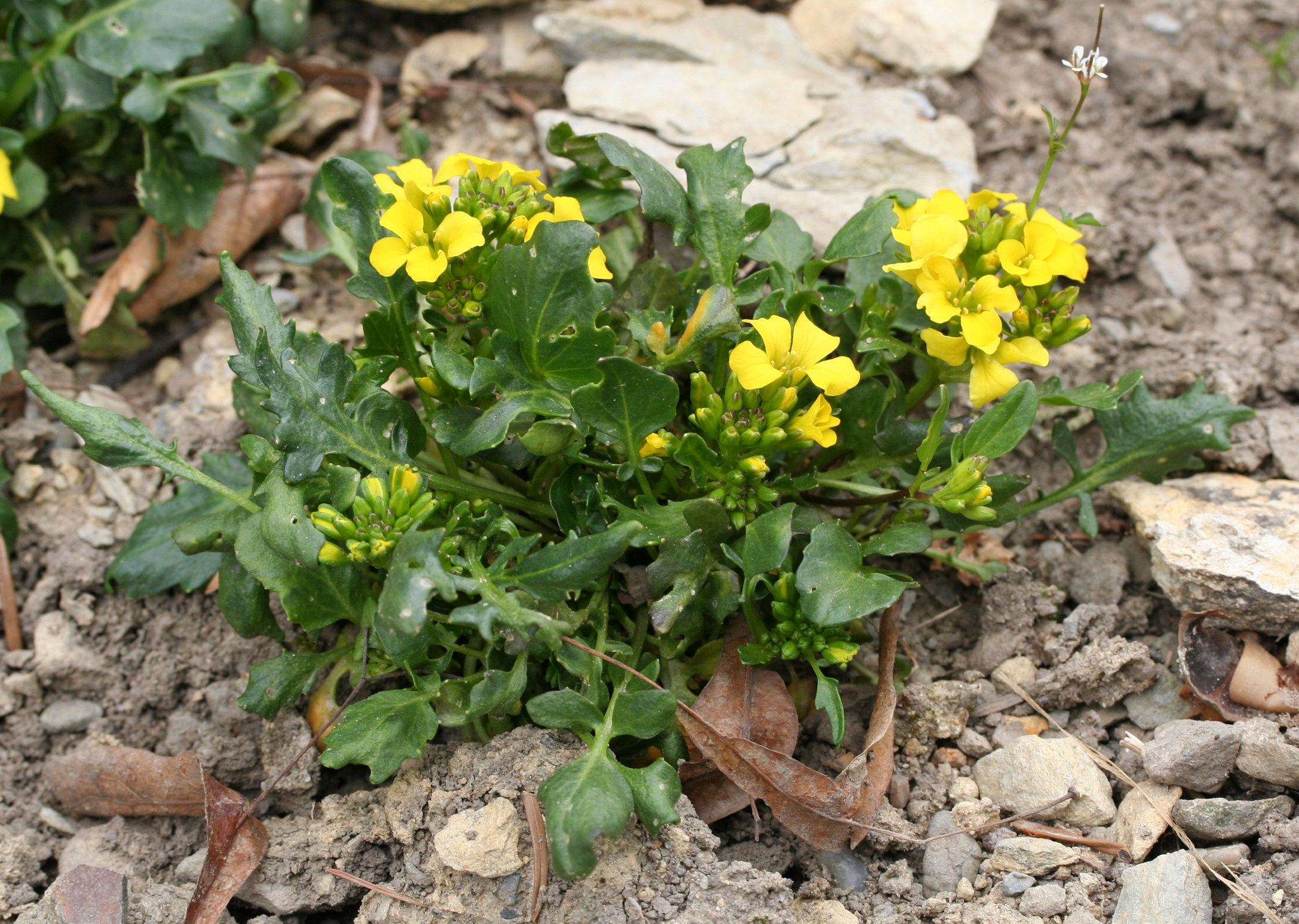 Raffenaldia primuloides im Botanischen Garten Dresden